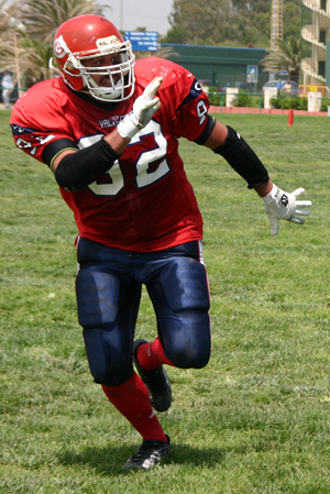 Victor Solis en las semifinales de la V LNFA 2